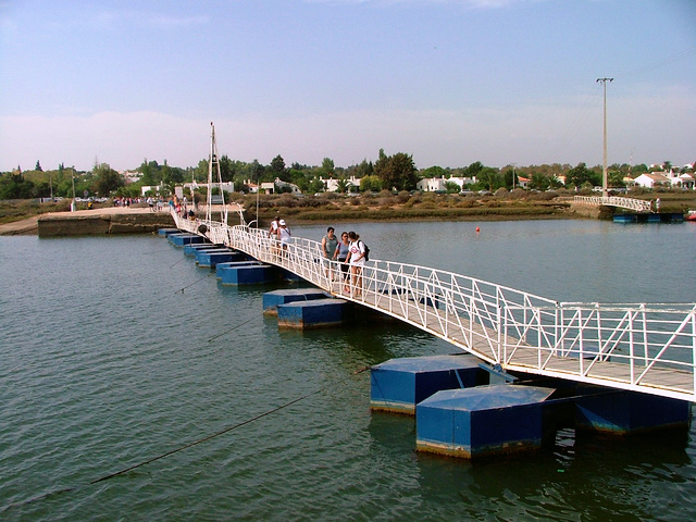 Ponte de acesso à praia do Barril